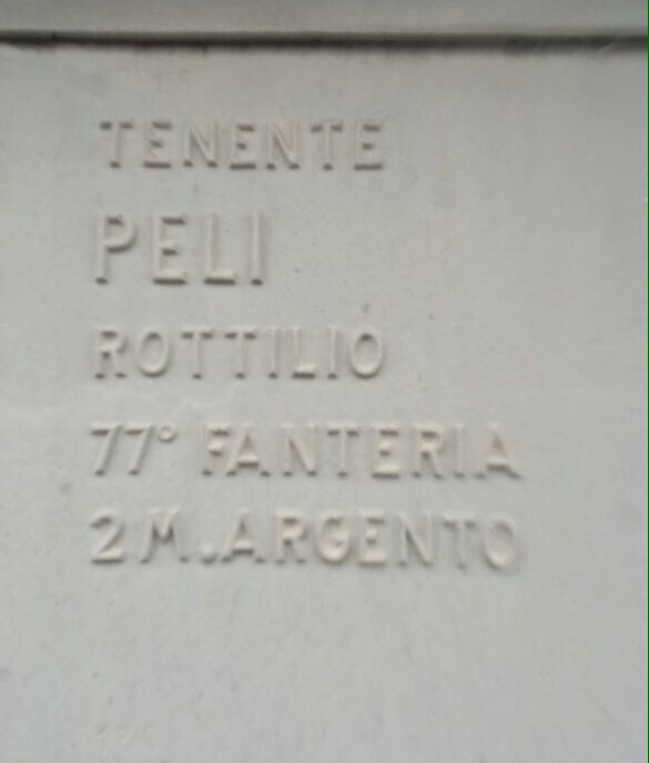 fotografia dell'iscrizione dedicata al Tenente Rottilio Peli, decorato con due medaglie d'argento al valor militare, sul XV gradone del Sacrario di Redipuglia